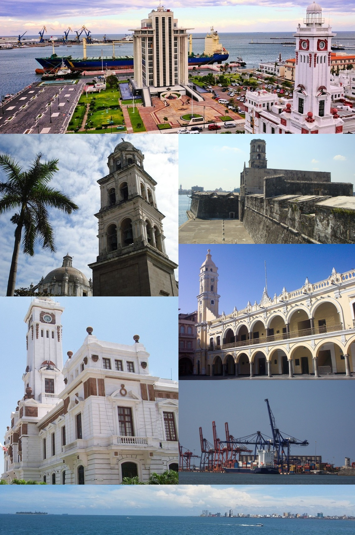 Veracruz